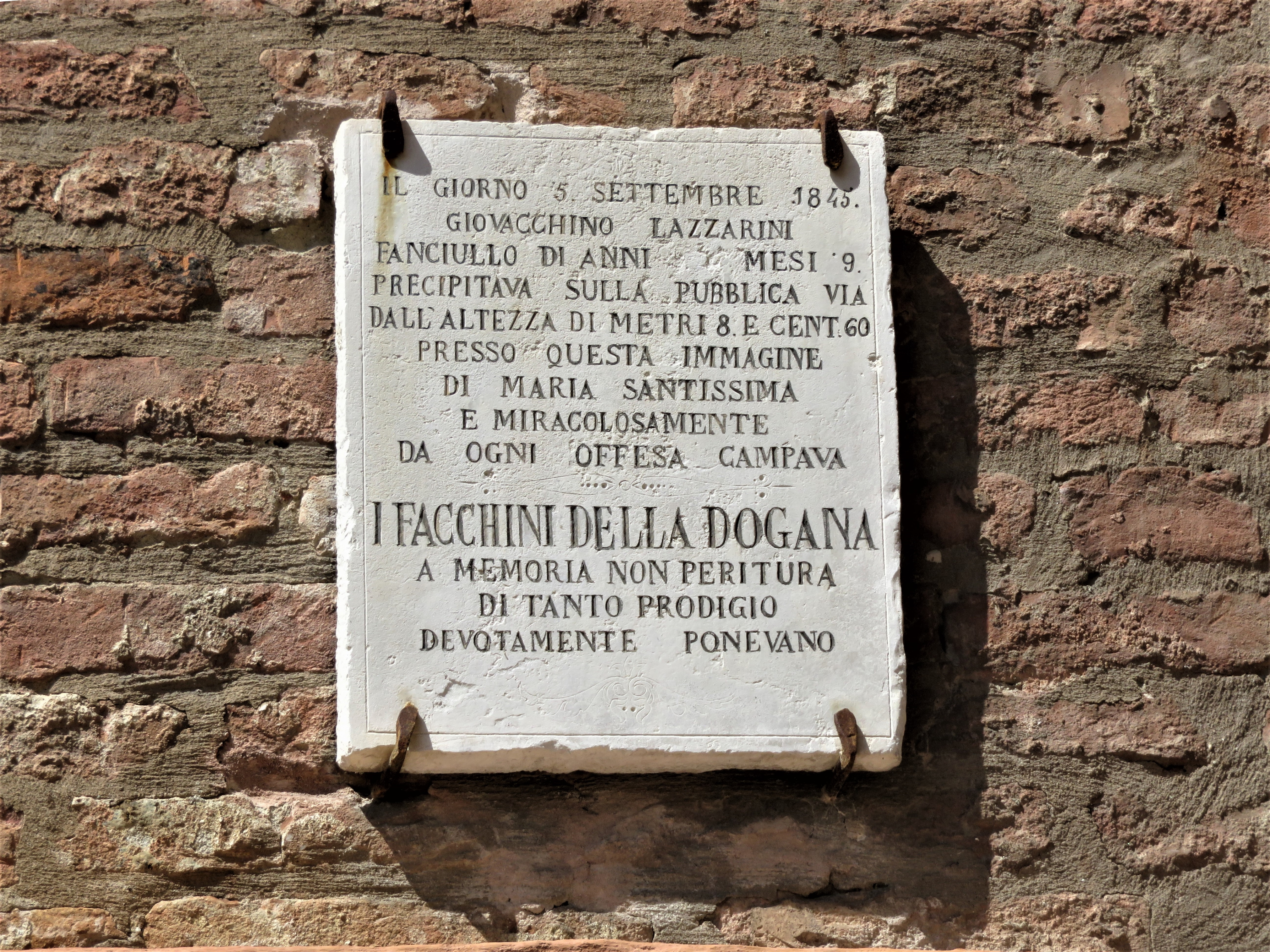 Madonna dei Facchini, lapide.